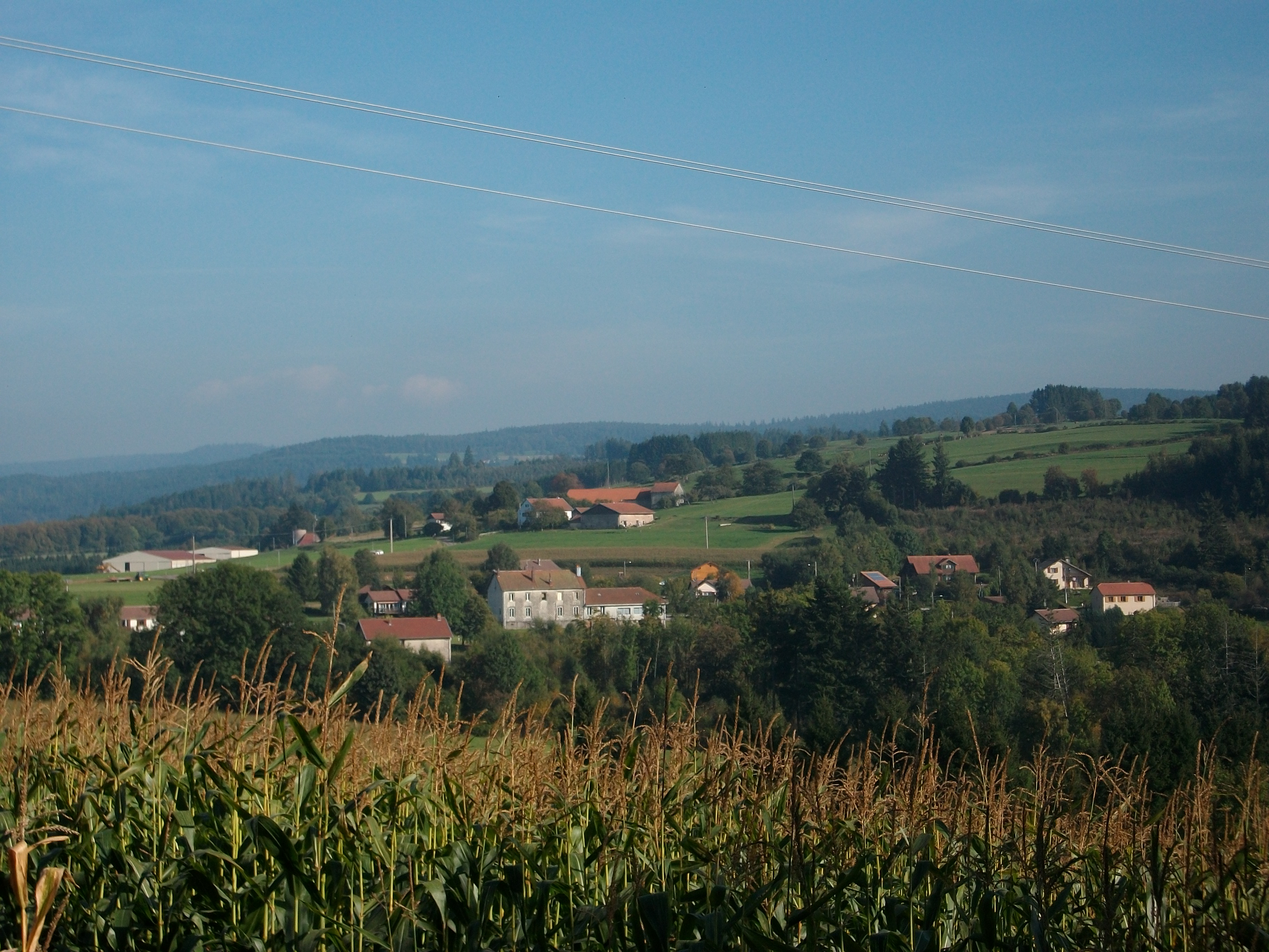 Village des arrentès de Corcieux